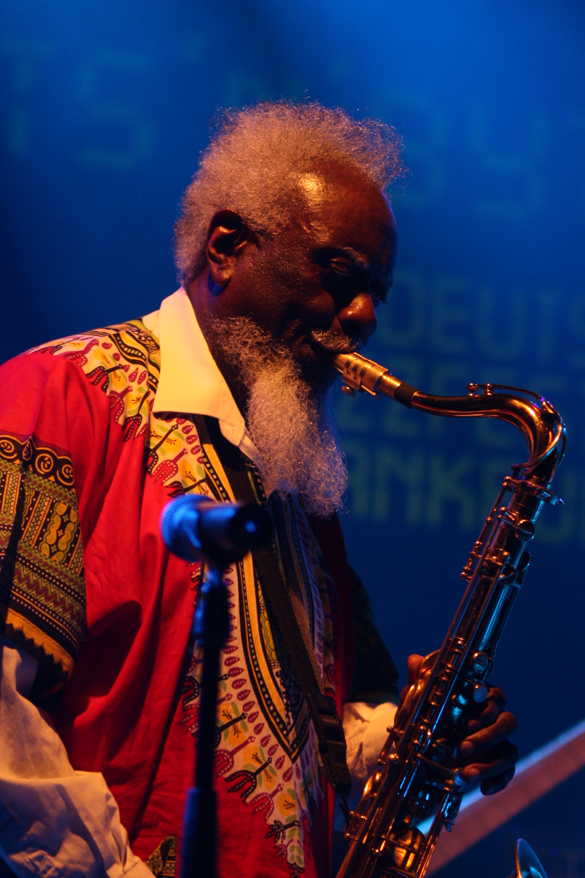 44. Deutsches Jazzfestival Frankfurt 2013: Pharoah Sanders